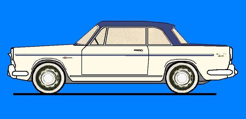 Disegno eseguito dal sottoscritto (Giomayo) utilizzando il programma "Paint" di Windows attingendo informazioni ed ispirandosi a quanto pubblicato a pagina 173 del numero 2 dell'anno 1961 della rivista "Quattroruote"